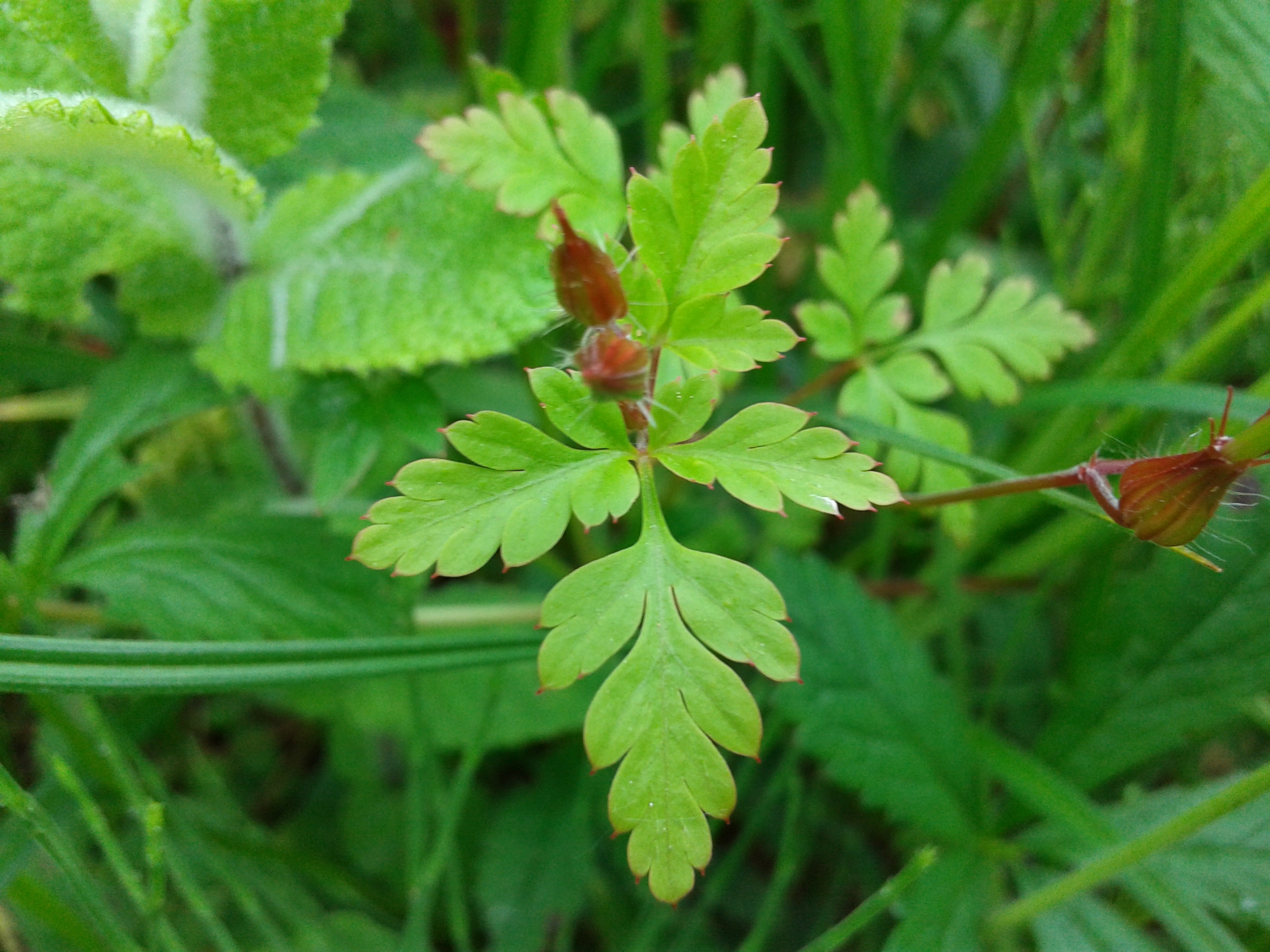 Geranium robertianum